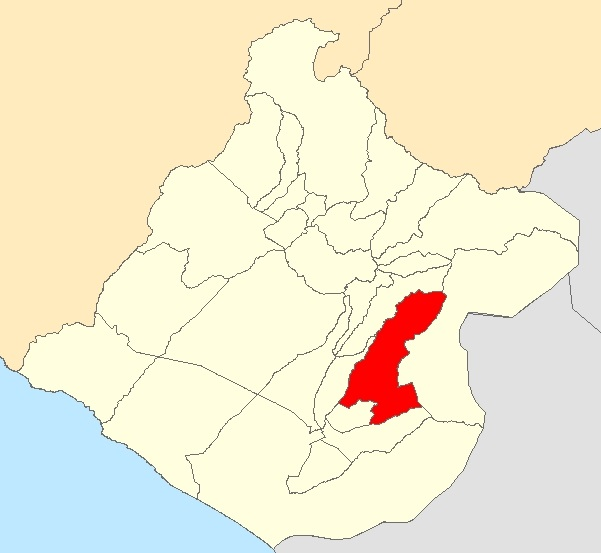 Mapa distrito Pachía,Tacna - Perú